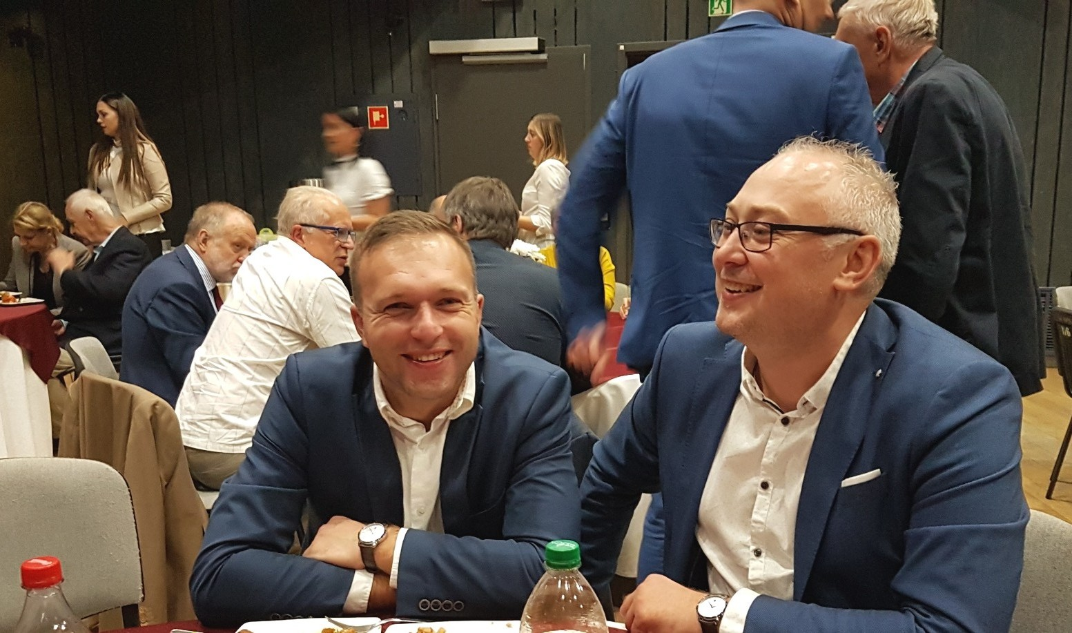 Jubileuszowa gala 70-lecie